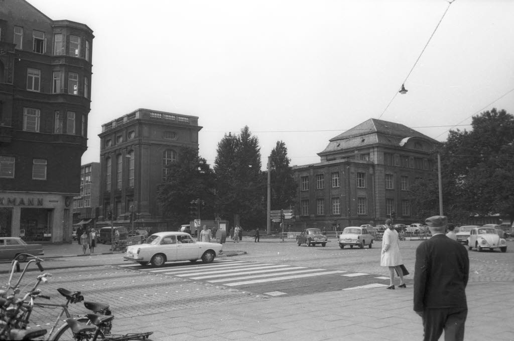 Blick vom Hauptpostamt über die Kreuzung Stresemannplatz. Links am Sophienblatt das Nebengebäude des Museums mit dem Alten Landeskeller, ganz links das Victoria-Eck mit der BMW-Vertretung Autohaus Schmoldt & Axmann im Erdgeschoss.